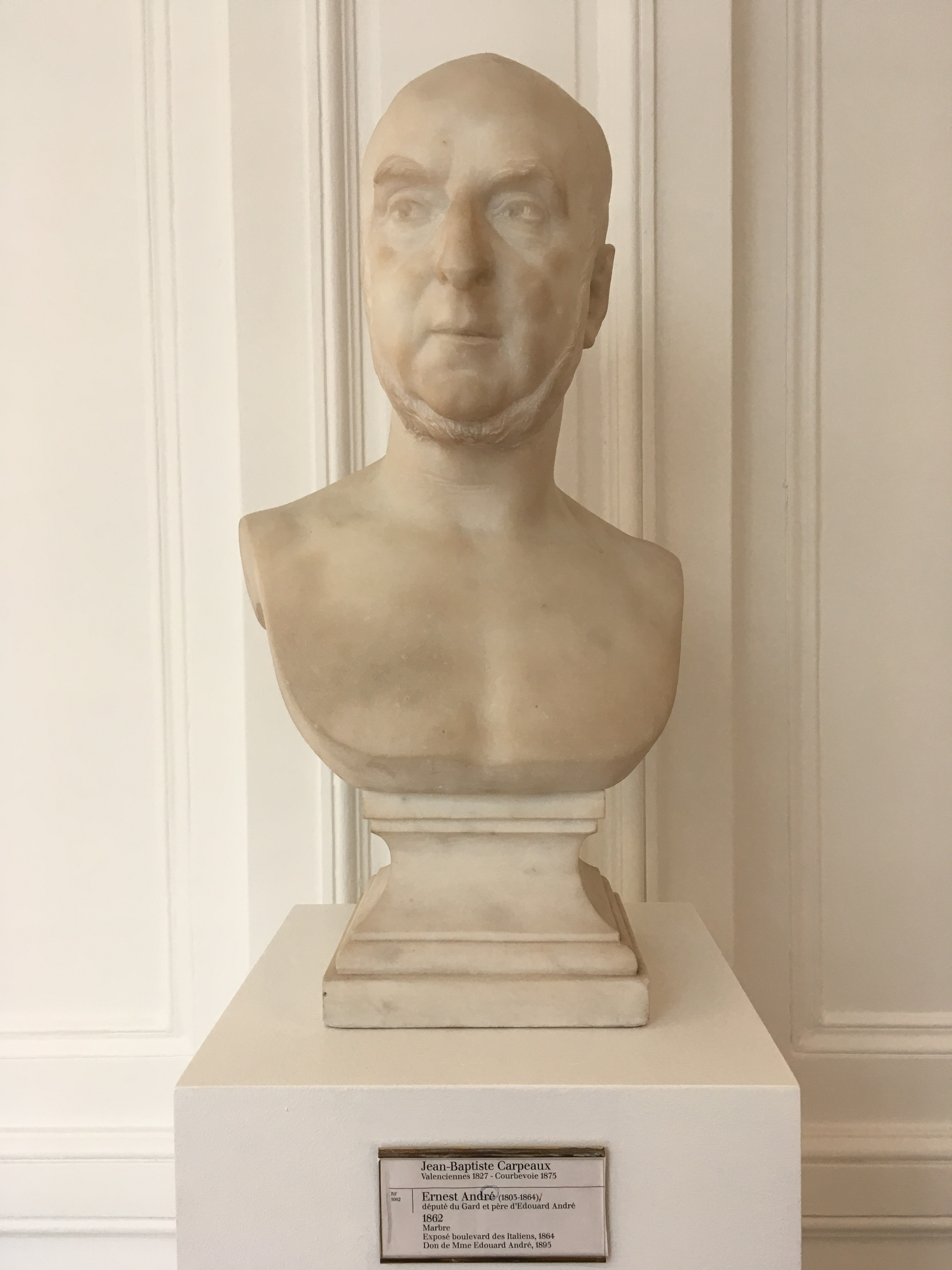 Jean-Baptiste Carpeaux, Buste d'Ernest André, 1862, marbre, Paris, musée d'Orsay